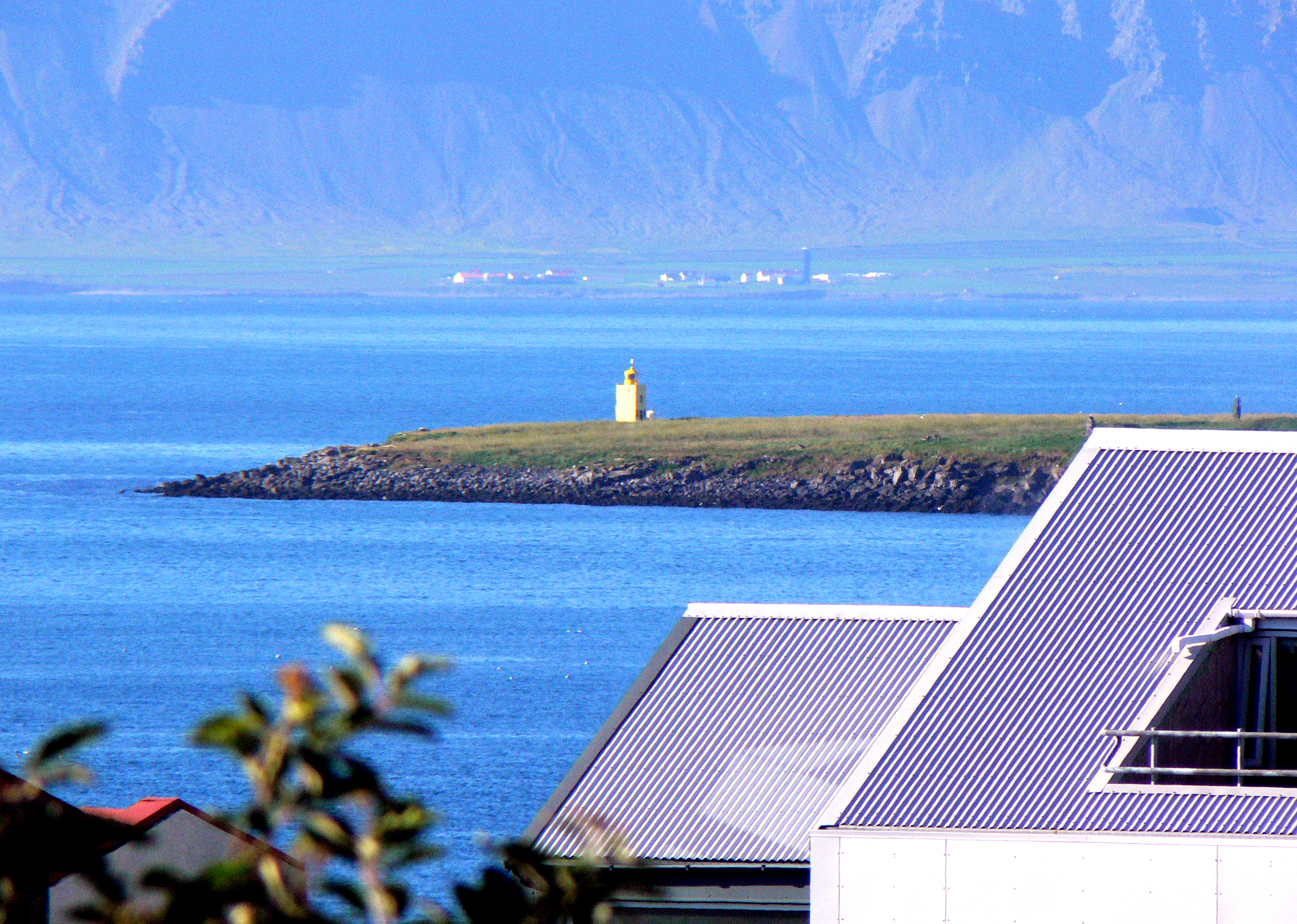 Hafenfeuer vor Reykjavík